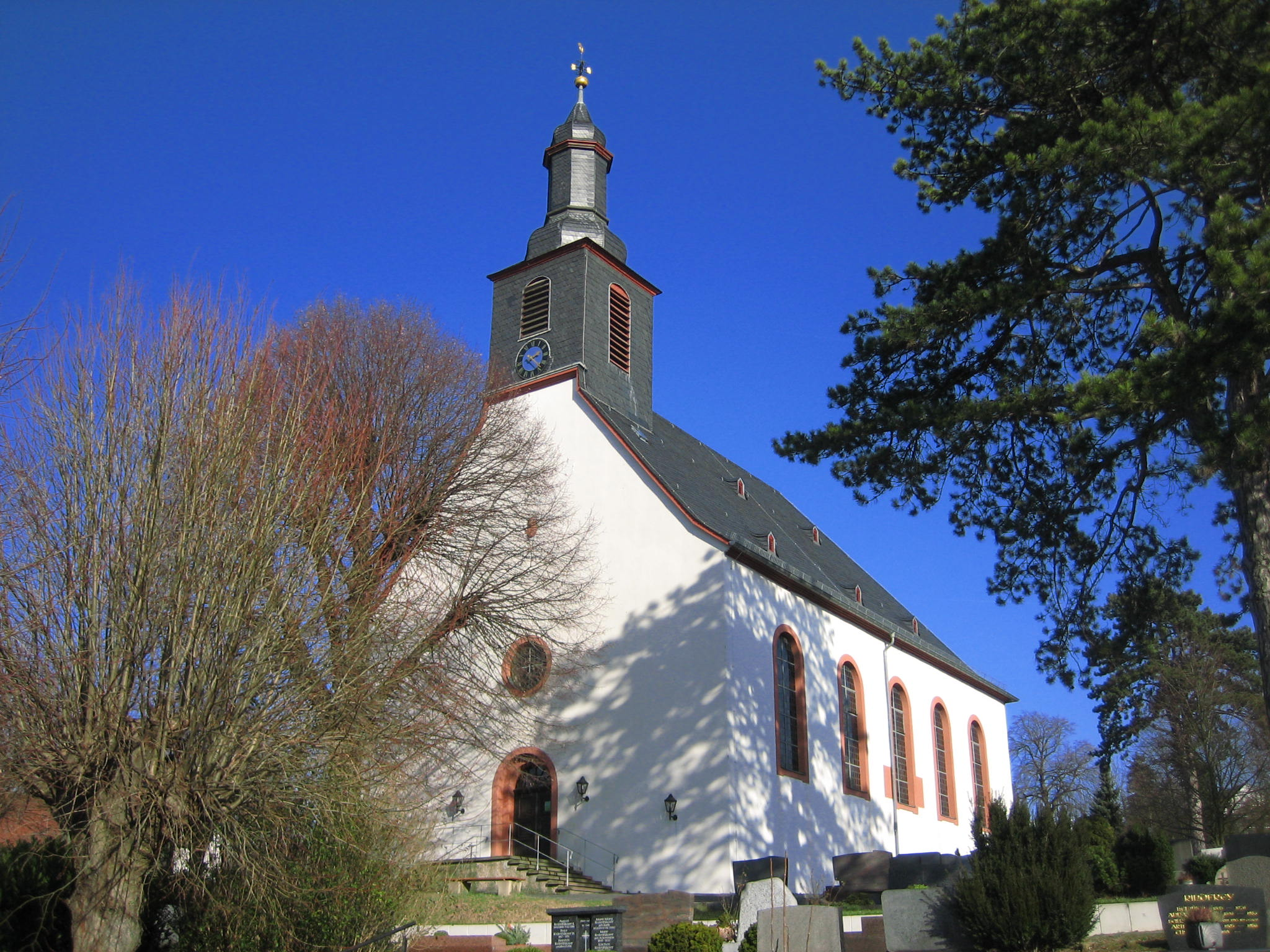 Evangelische Kirche in Ober-Ramstadt, Hessen, Deutschland